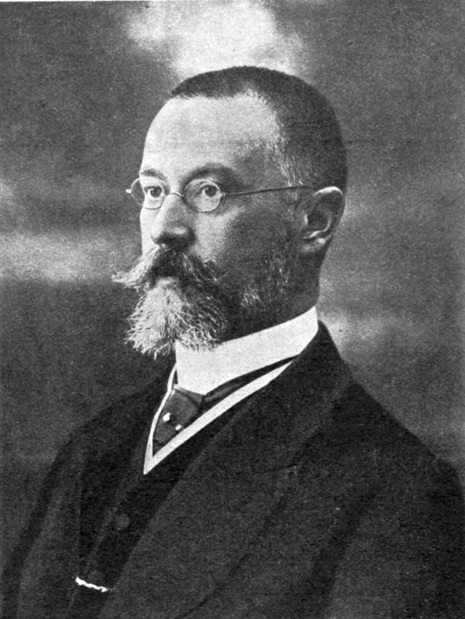 Макаров, Александр Александрович